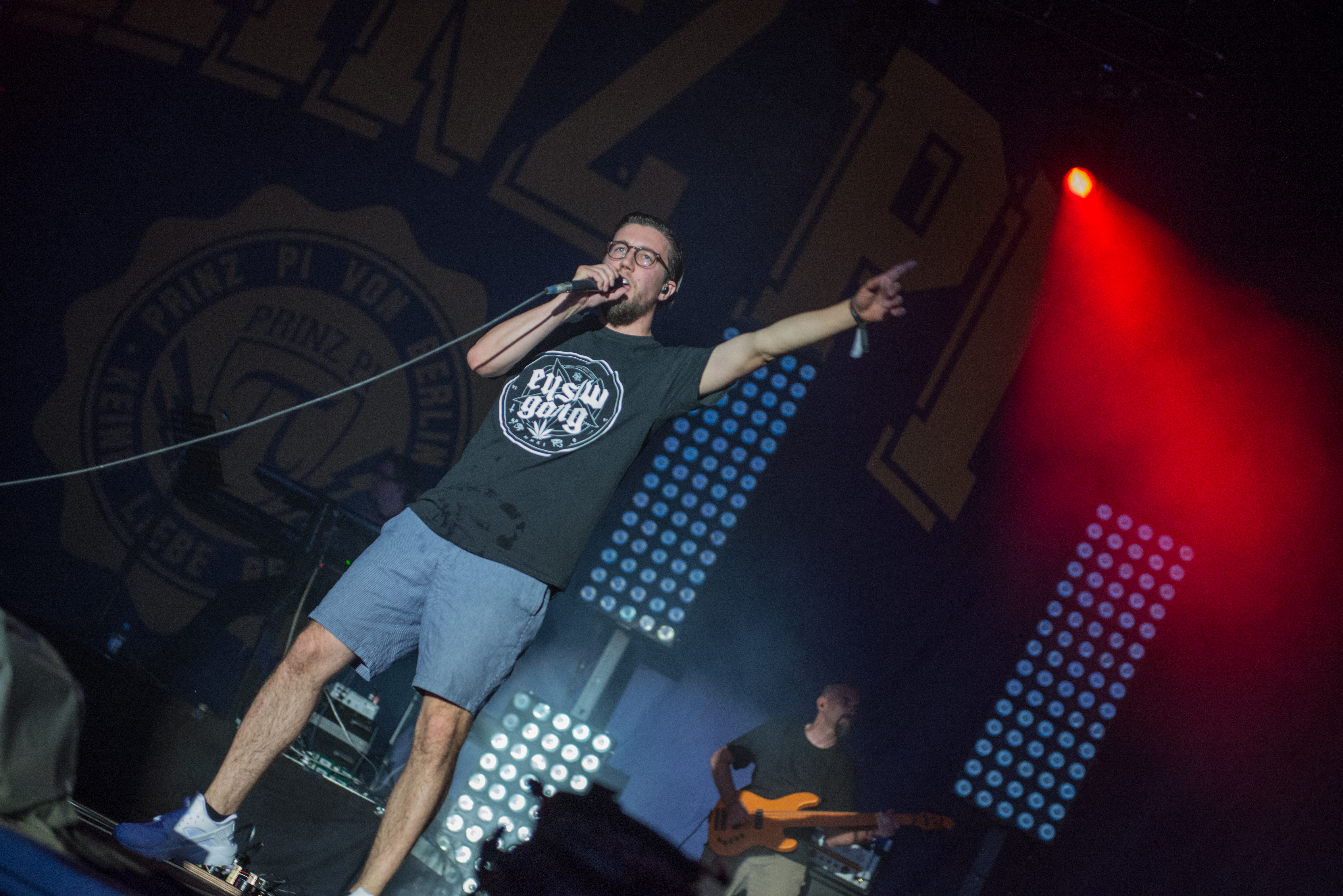 Prinz Pi auf der Vulcano Stage